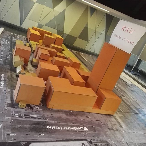 Model einer möglichen Bebauung des RAW am der des Beschlusses des B-Plans im Rathaus Friedrichshain-Kreuzberg